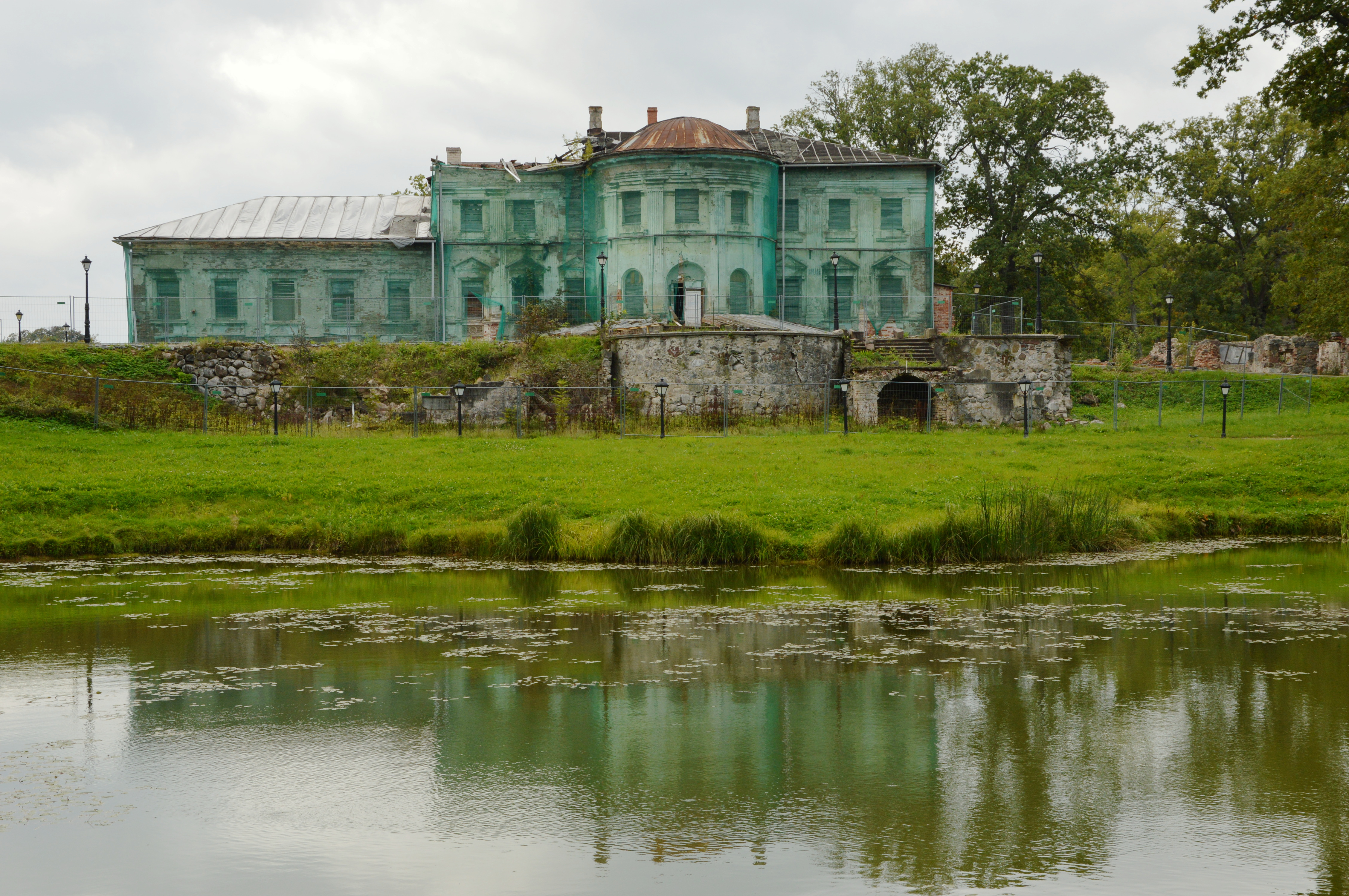 Vana-Gulbene mõis, avariilises seisukorras olev Balta pils ehk Valge loss.